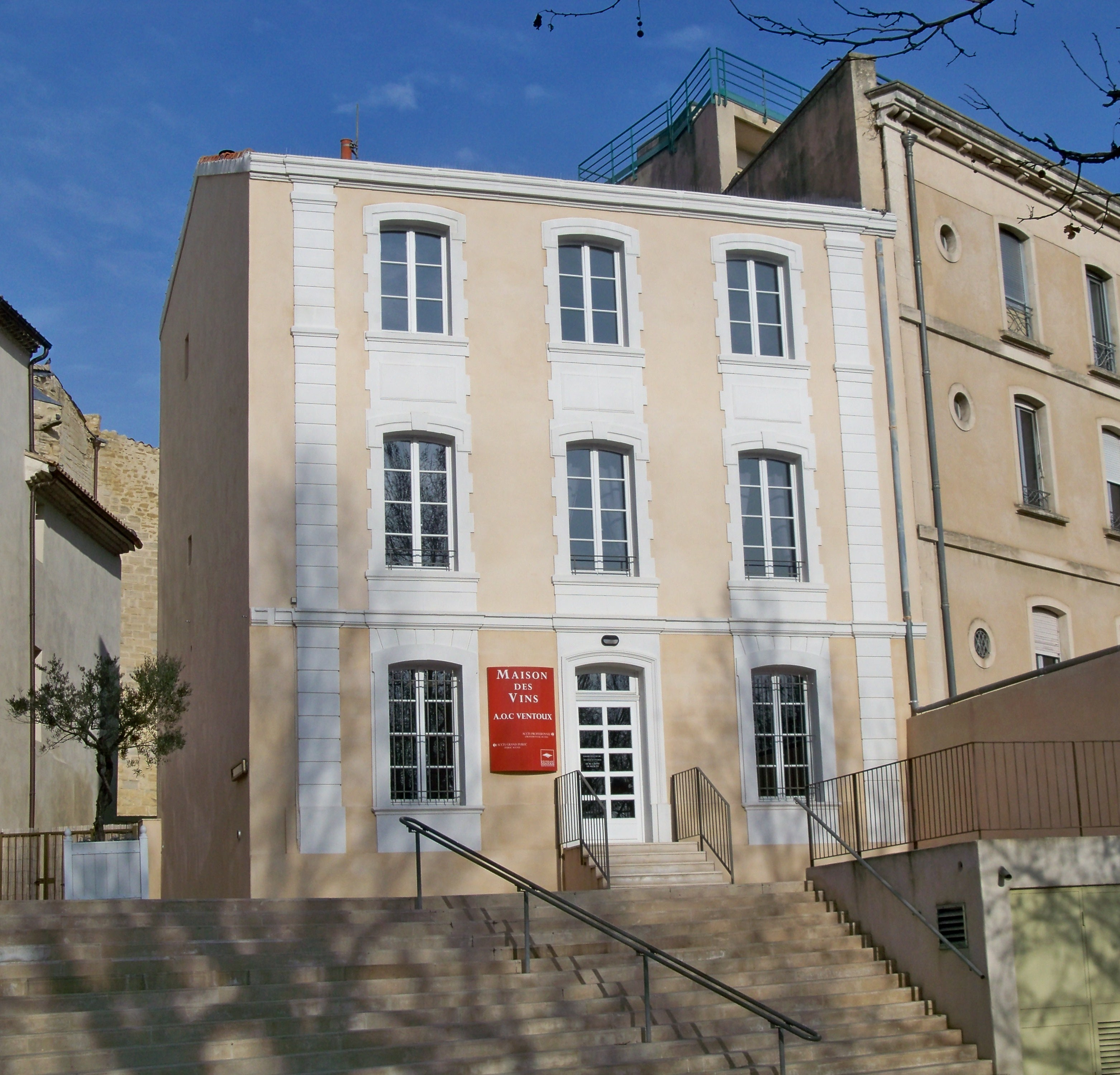 Maison du vins AOC Ventoux à Carpentras (84)